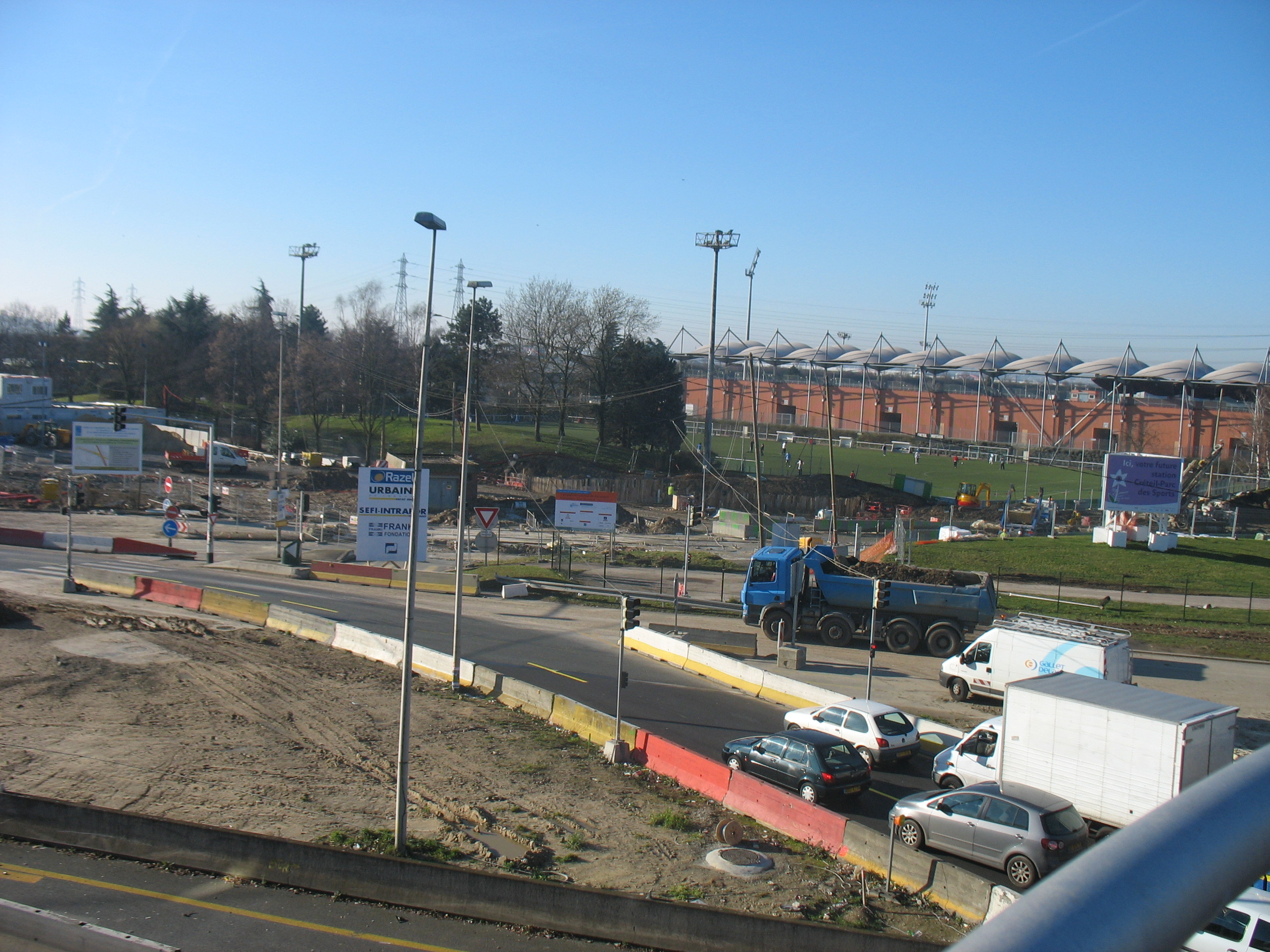 Au premier plan, le carrefour RD1/RD60. À gauche, au second plan, l'emplacement de la station Parc des Sport. À droite, au second plan, l'emplacement de la gare routière. En arrière plan, le terrain d'entraînement et le stade Duvauchelle de Créteil.